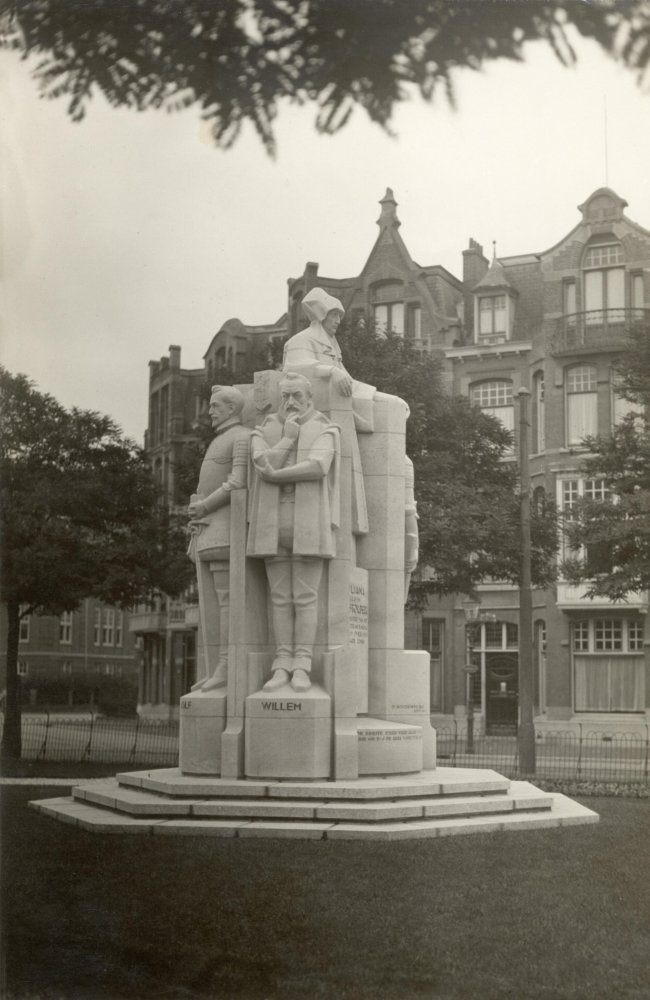 Het monument ‘Juliana van Stolberg’ herinnert de inwoners van Den Haag aan de meer dan 500 stadsgenoten die zijn omgekomen toen de Britse luchtmacht op 3 maart 1945 door een noodlottige vergissing het Bezuidenhout heeft gebombardeerd. Te midden van de verwoeste woonwijk was dit beeld zo goed als onbeschadigd overeind gebleven. Collectie: Spaarnestad Photo Fotograaf: Spaarnestad Datum: Onbekend Fotonummer SFA003012891 Code: 5011 Voor meer informatie en foto's uit deze en andere collecties bezoek